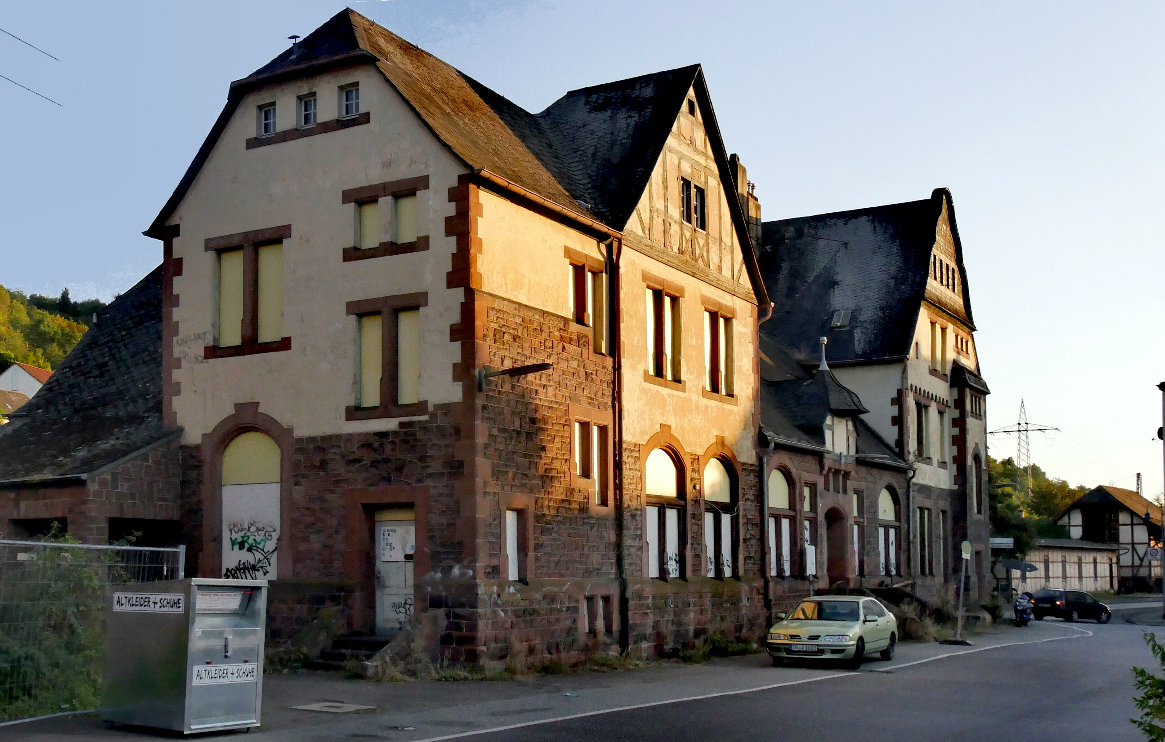 Bahnhof Konz Karthaus (Rheinland Pfalz) Gesamtanlage